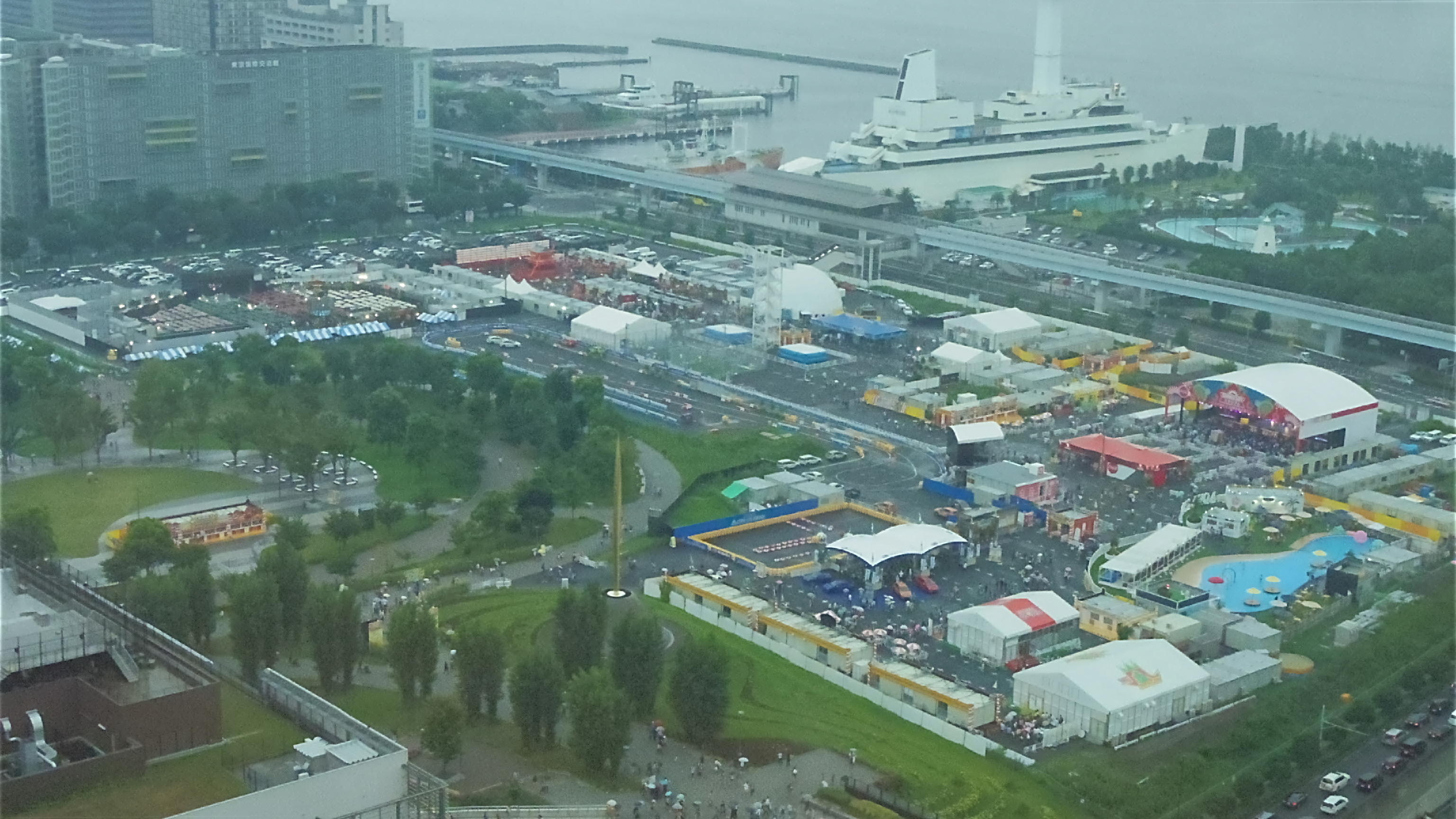 フジテレビの夏イベント「お台場夢大陸」(2015年)の「オマツリランド」ほぼ全景。フジテレビ本社屋24階より撮影。